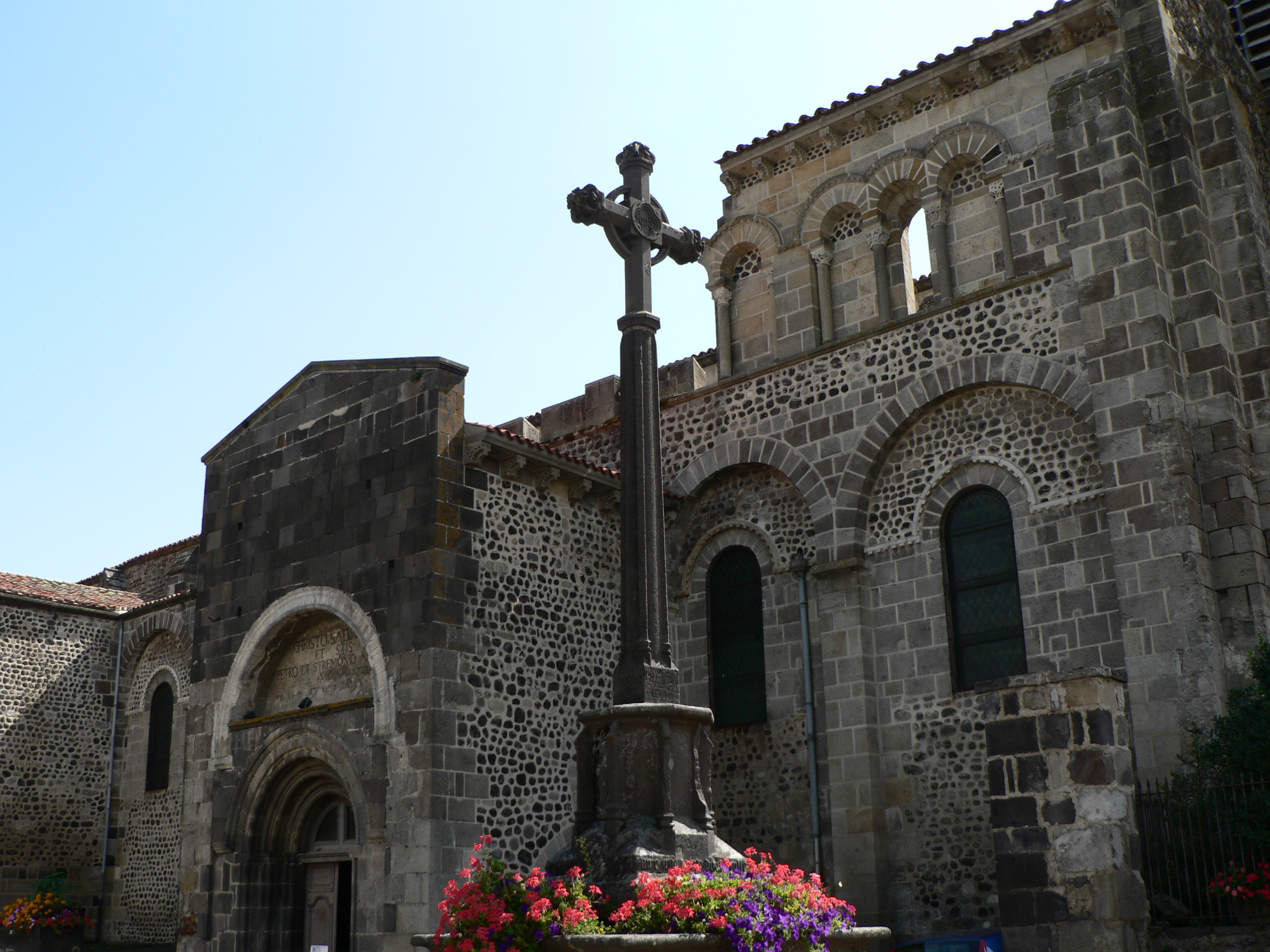 Façade nord de l'église Saint-Pierre de Mozac (Auvergne - France)